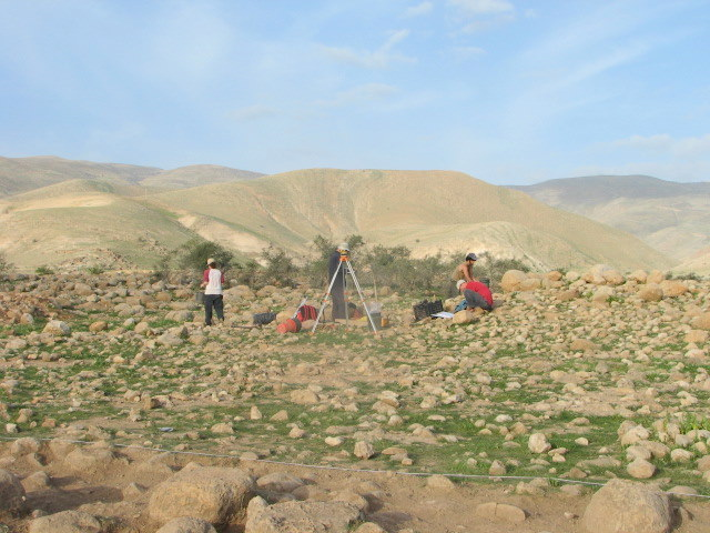 Fatzael 7 Chalcolithic Archaeology site in Fatzael Valley in the west side of Jordan Valley, Pictures from February 2010 excavation season אתר הארכאולוגי פצאל 7 מתוארך לתקופה הכלקוליתית, נמצא בבקעת פצאל בבקעת הירדן. צילומים מתוך עונת החפירות של פברואר 2010 מדידת גובה השטח הנחפר באזור המבנה באצעות מאזנת אופטית